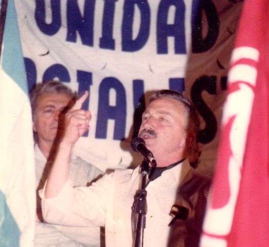 Guillermo Estévez Boero. Acto. Buenos Aires, 1987. Autor: Pepe Robles Usuario: roblespepe